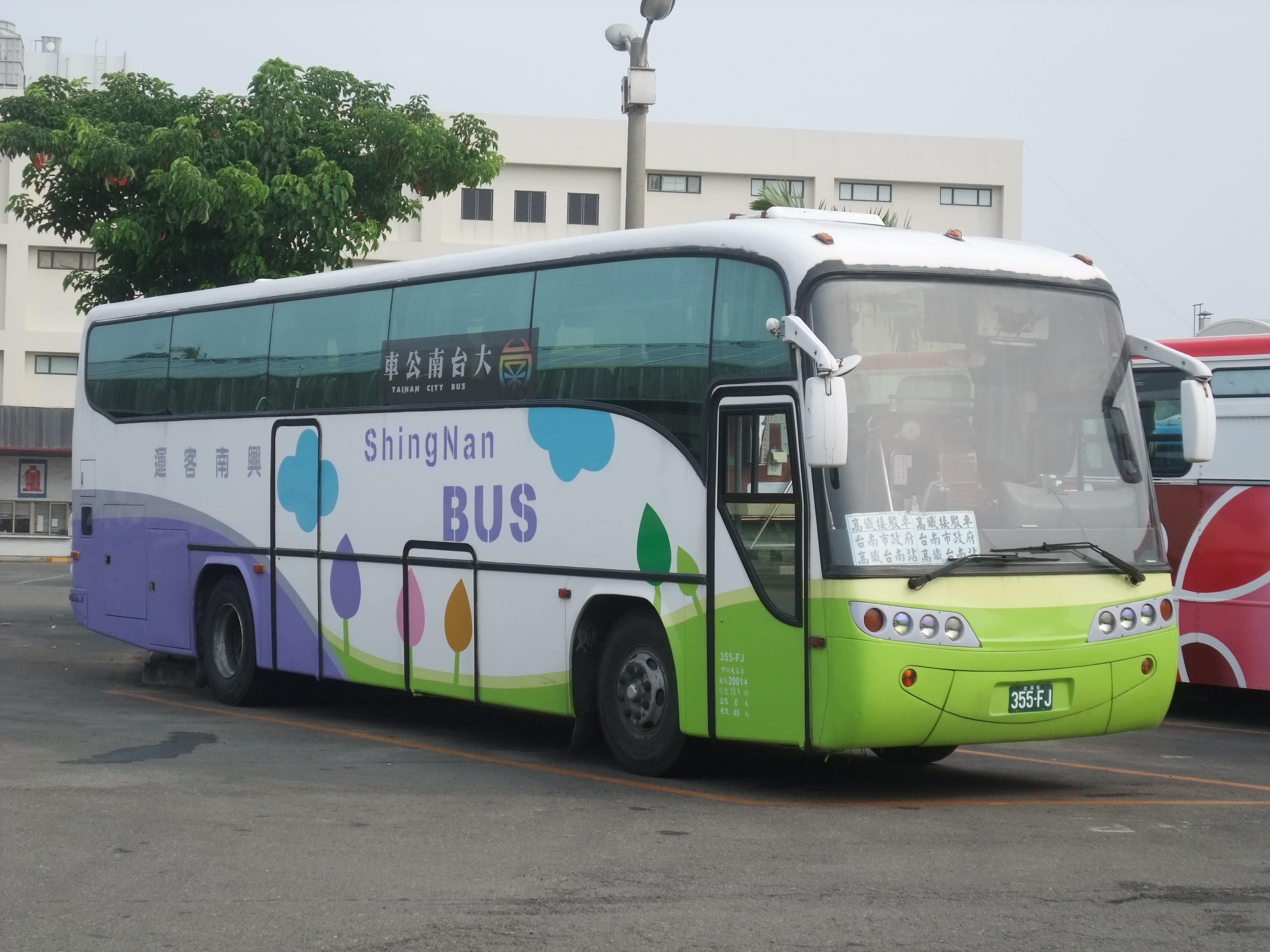 興南客運2001年花蓮客運移籍大客車355-FJ，供學生專車及台灣高鐵台南站接駁車調度使用。